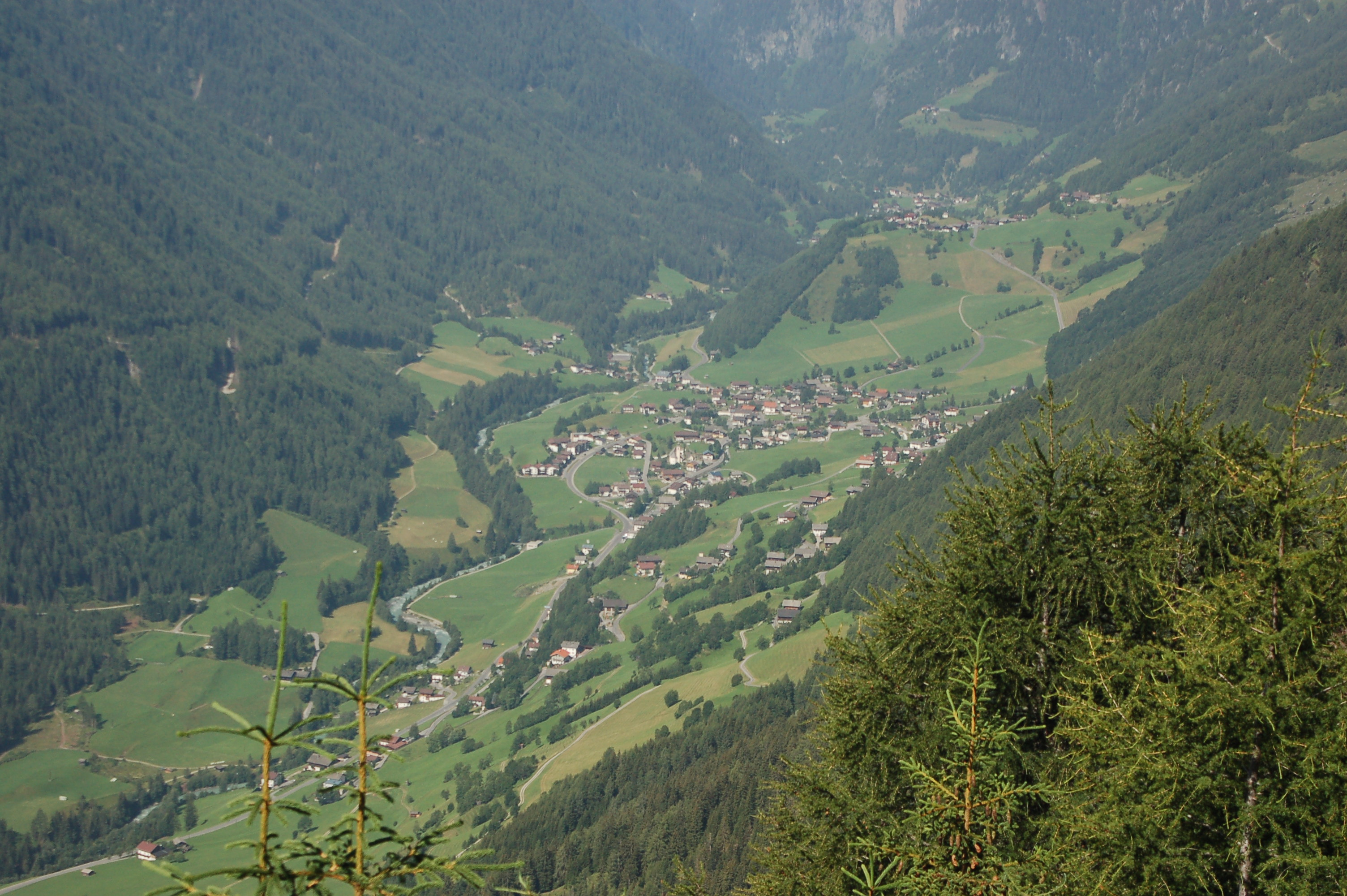 Blick von Budam auf Prägraten